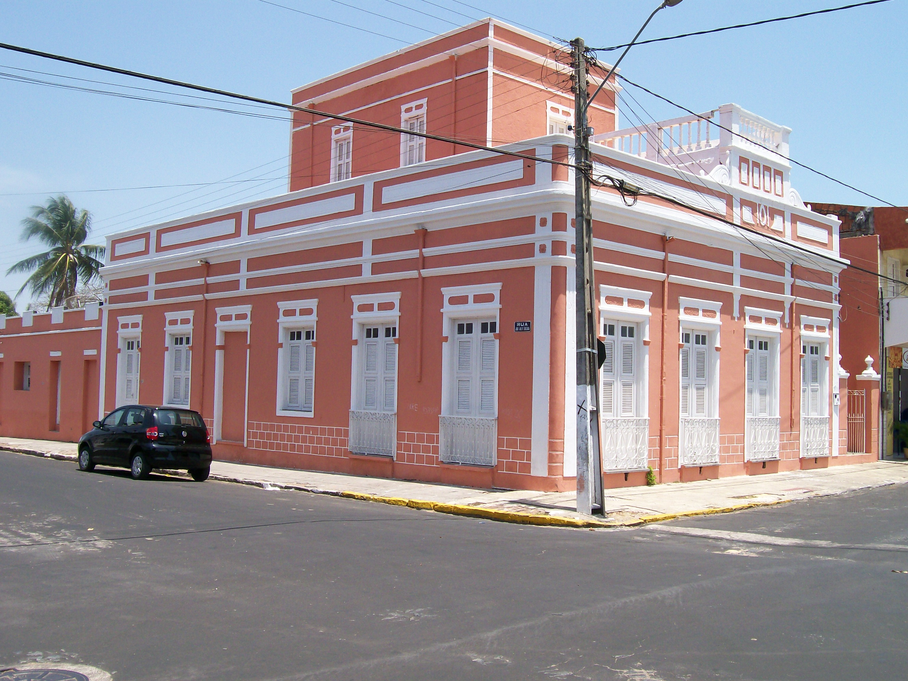 Casarão da Praça